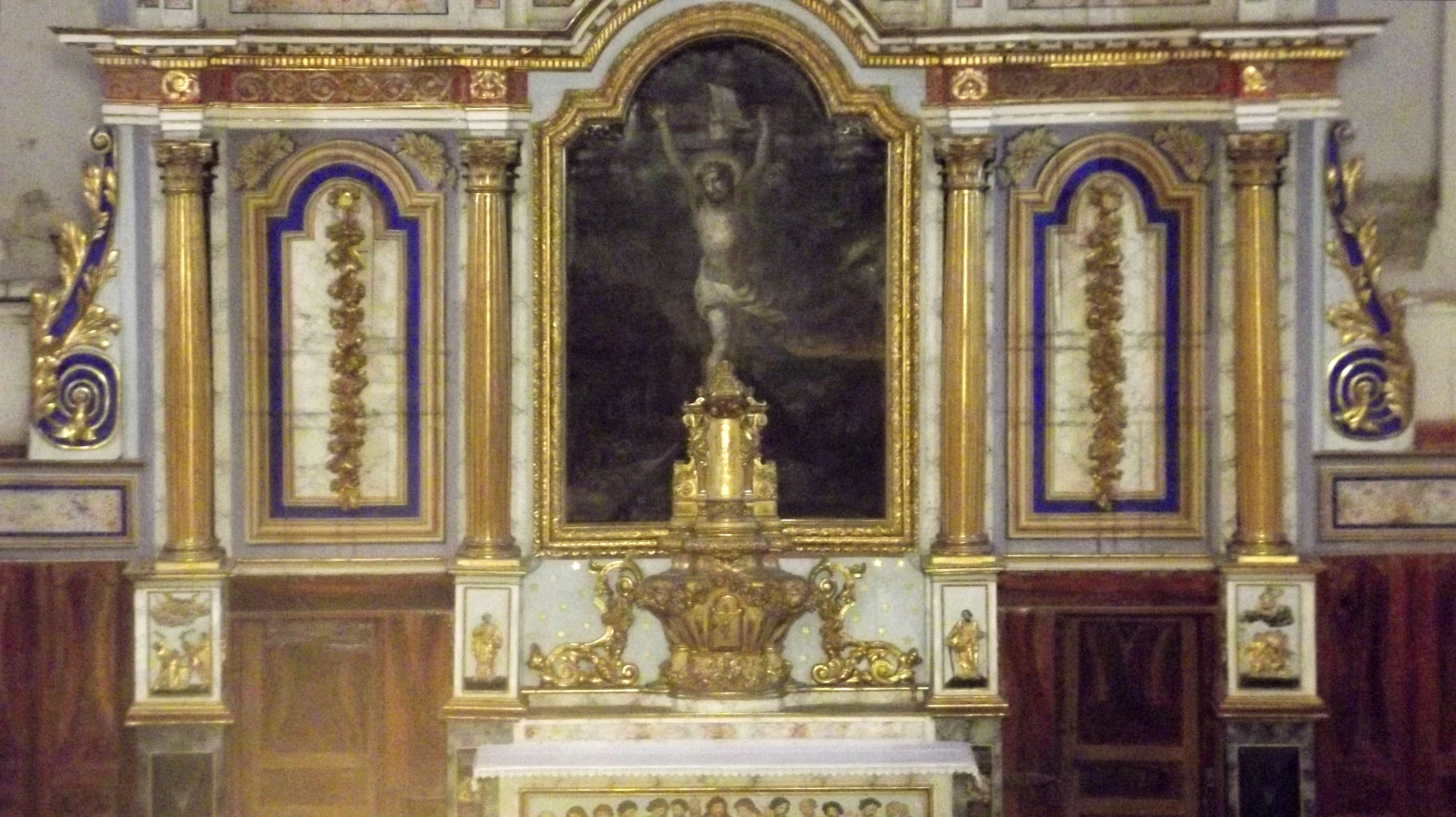 Église du XIVe restaurée au XVIIIe, retable placé en 1858